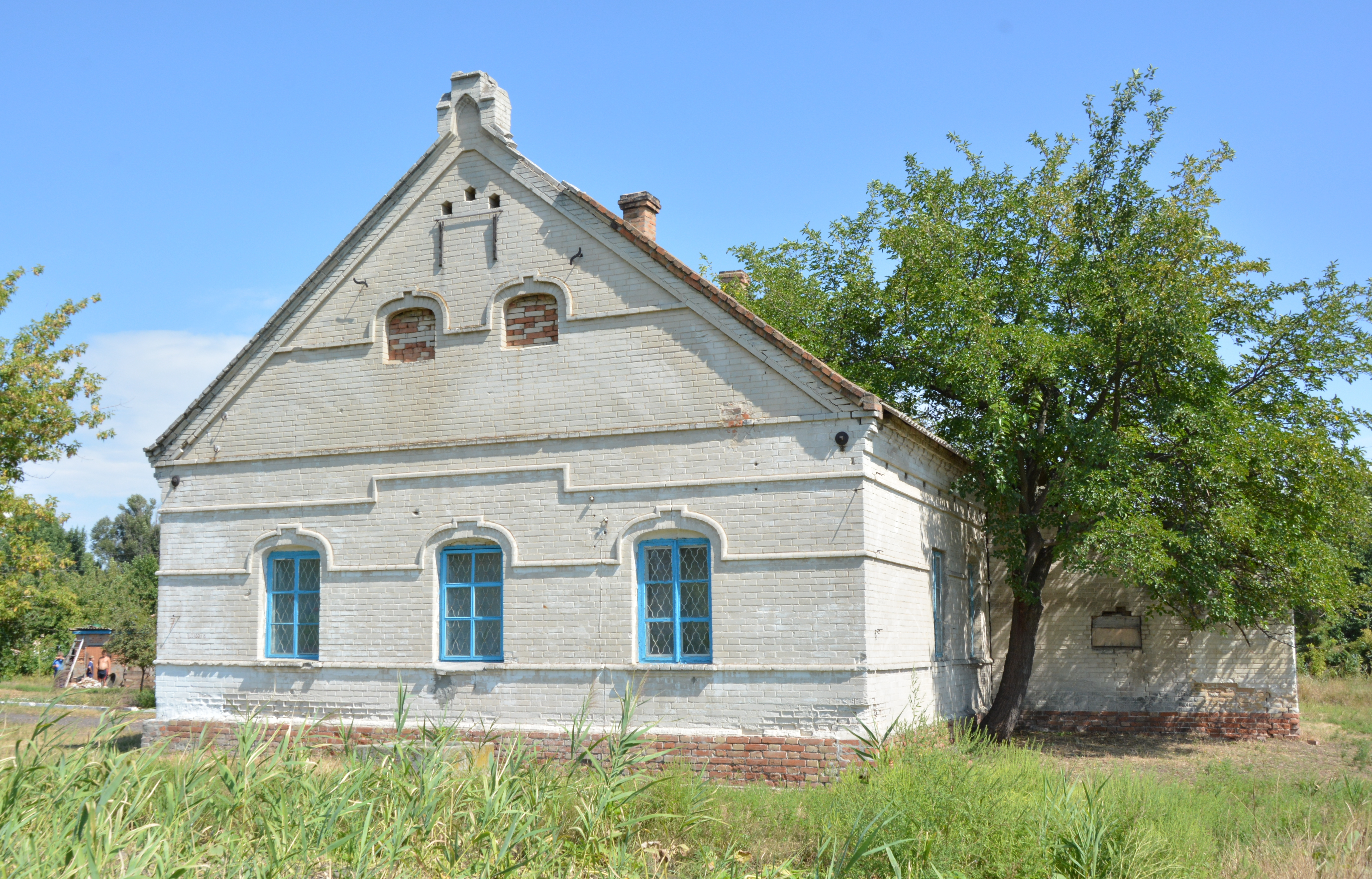 Лікарня німецької громади, Молочанськ